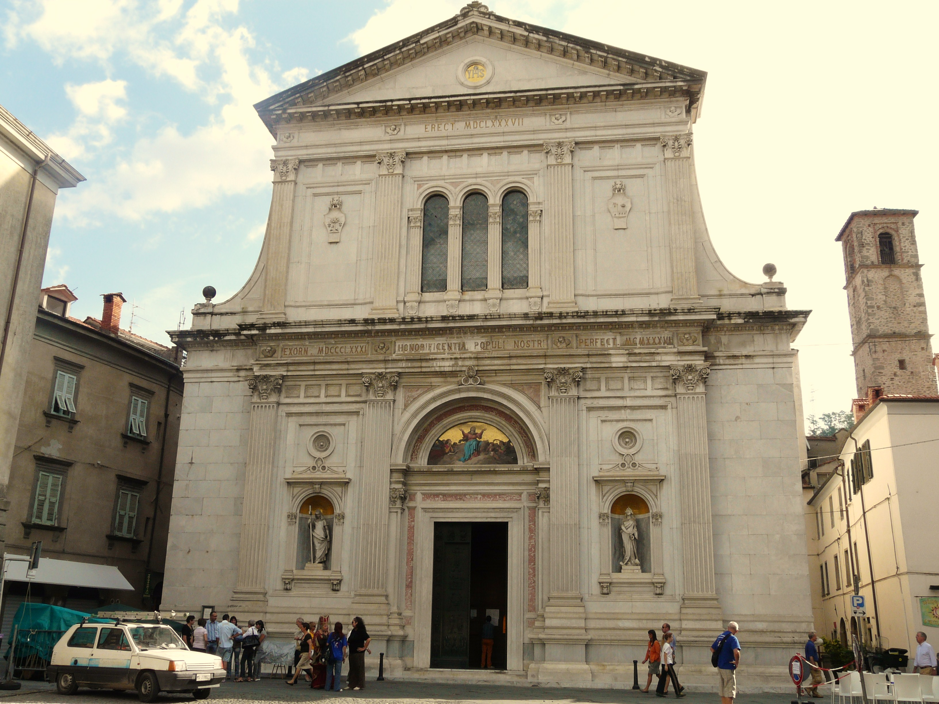 Interni della Cattedrale di Santa Maria del Popolo, Pontremoli, Toscana, Italia